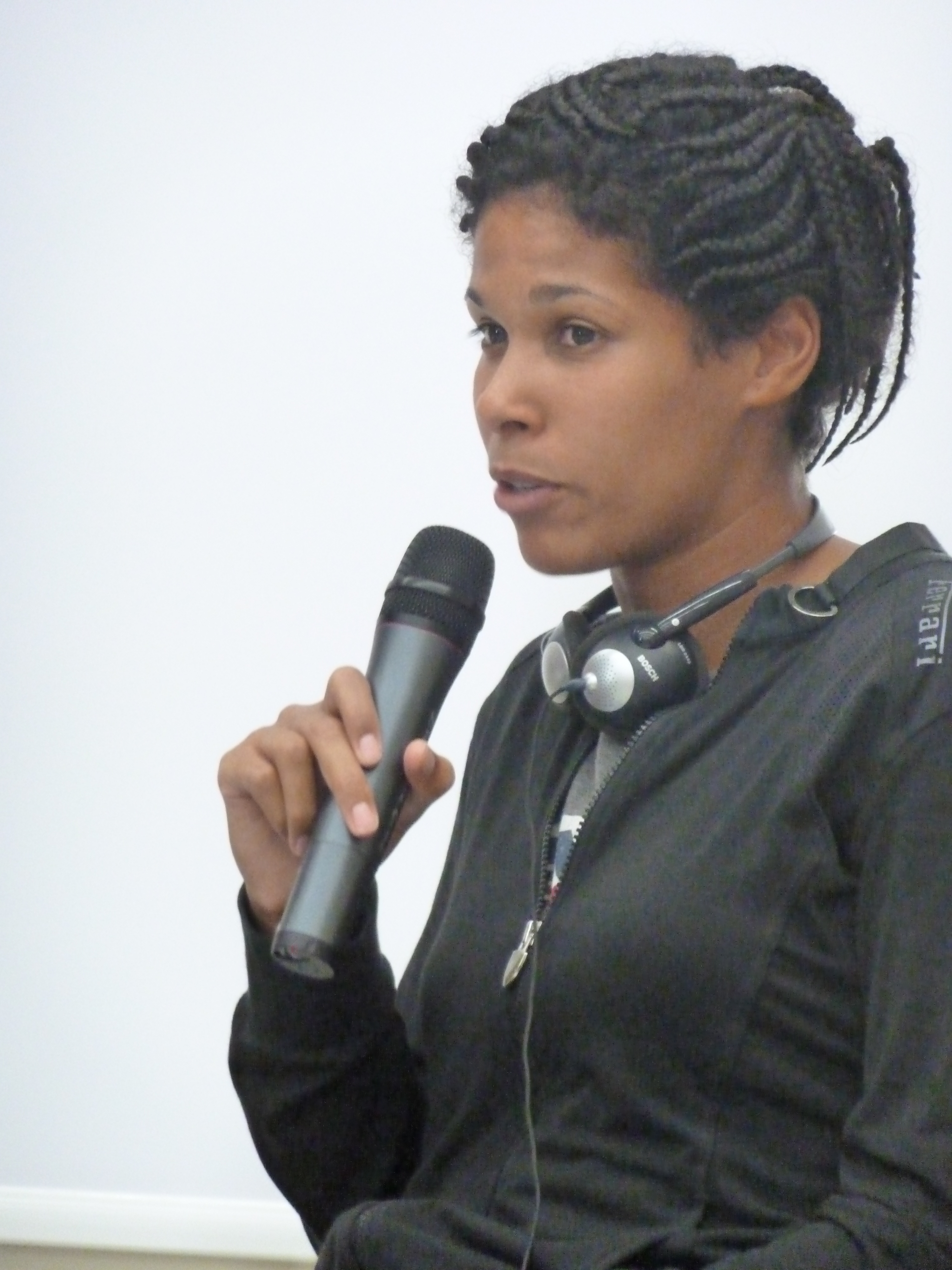 Navina Omilade (VfL Wolfsburg und Frauen-Nationalmannschaft) Foto: Gunda-Werner-Institut